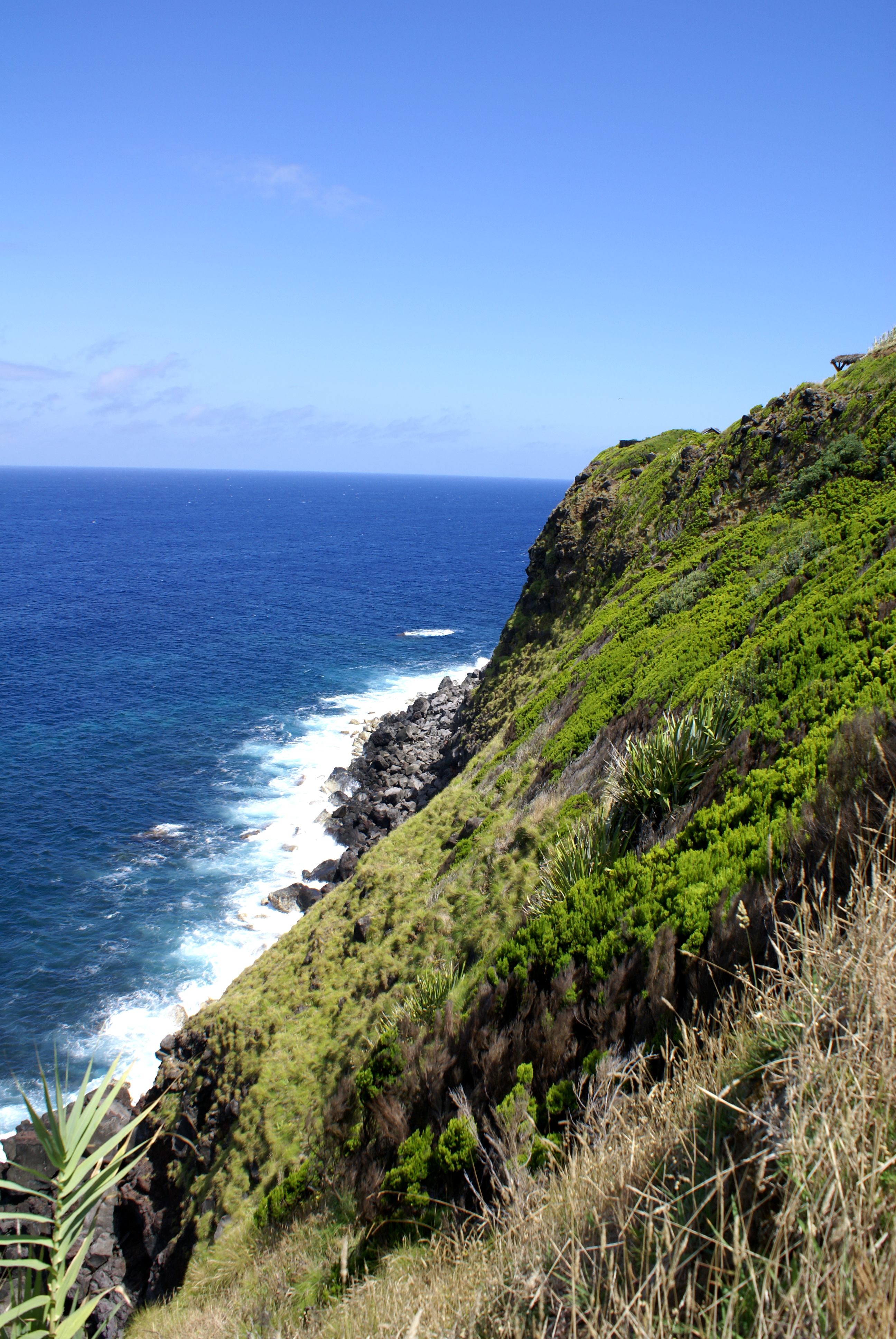 Miradouro do Pelado, Lomba da Fazenda, Nordeste, ilha de São Miguel, Açores